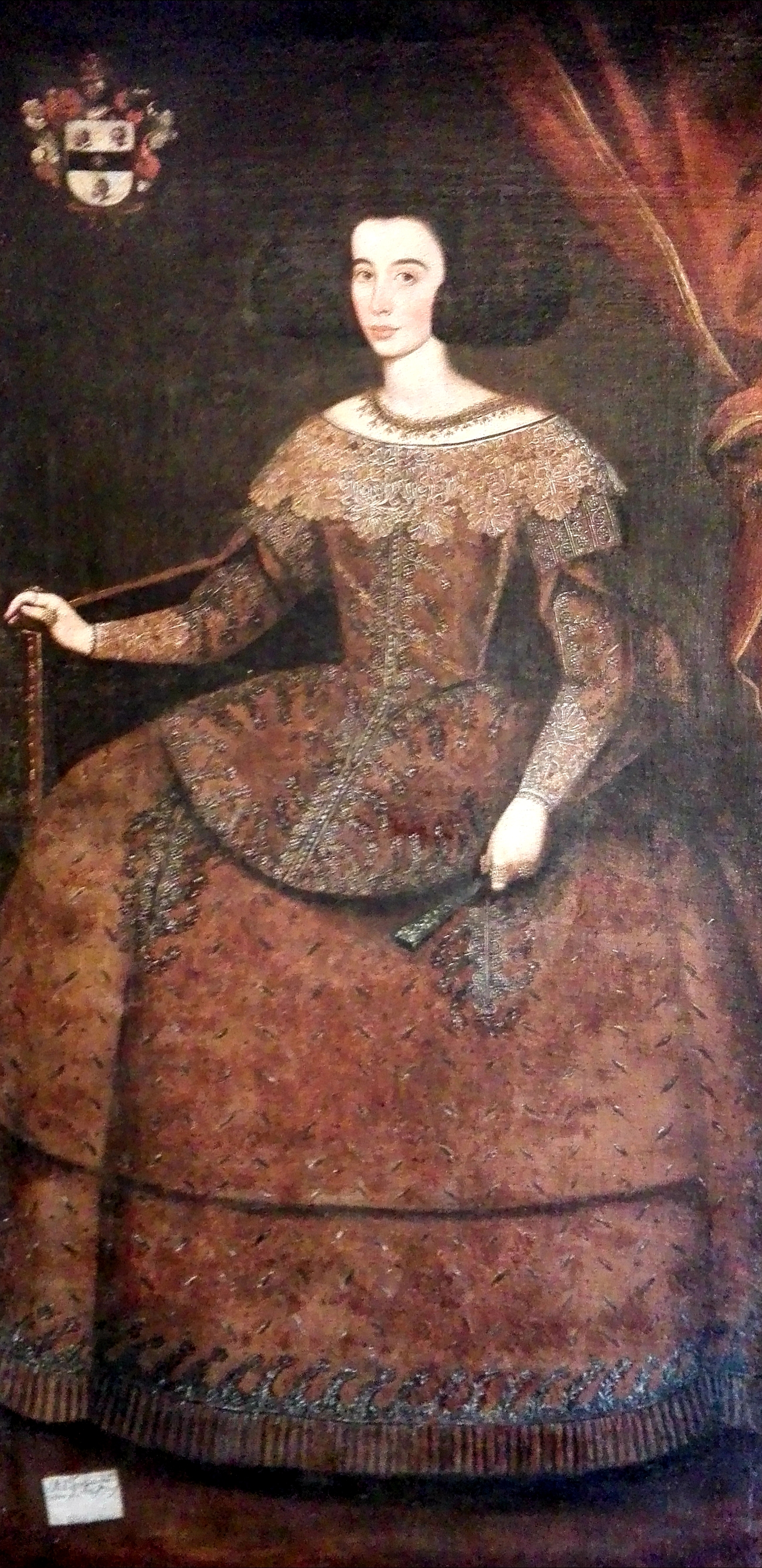 Oleo. Pintura Española Siglo XVII. Anónimo. Hacia 1641. Retrato de Luisa Francisca de Neve y Ramírez de Cartagena. Retrato encargado por Juan Arias de Saavedra y Ramírez de Arellano para la galería de Retratos de la familia en su Palacio de la Torre en la Plaza de san Pedro en Sevilla.